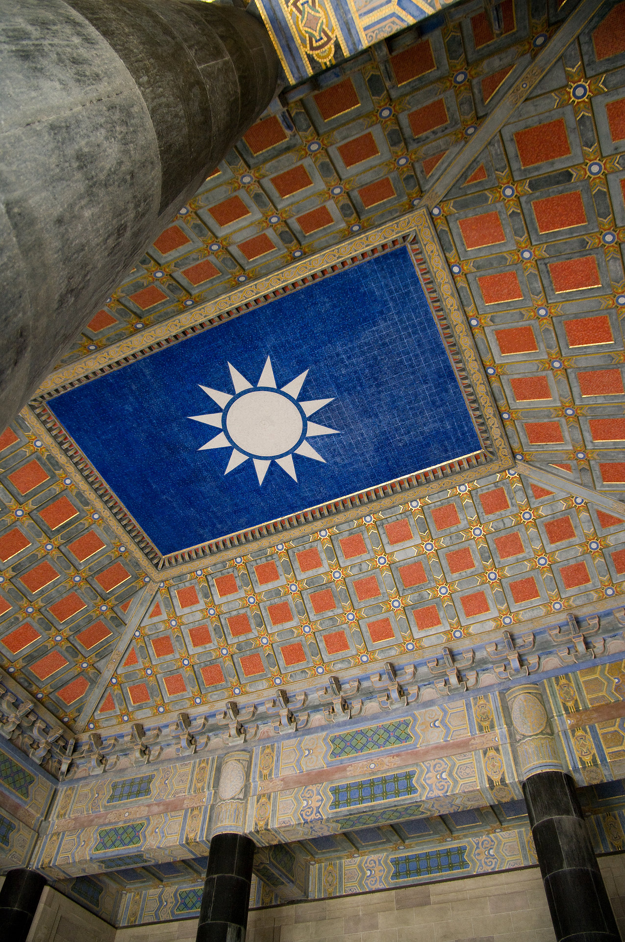 中山陵祭堂天花板